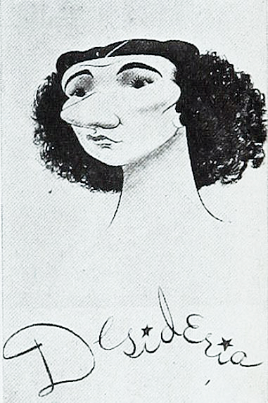 "¡LA DESIDERIA! ¡Esta igual!... Hará una jira (sic) por los teatros de barrio, con "El Relegado de Pichintún" y "Carmen Rosa Chandía"." Ana María Luisa Delicias Villela Francisca de Asís González Olea (Peñalolén, 4 de mayo de 19151 - Santiago, 21 de febrero de 2008) fue una primera actriz chilena de cine, radio, teatro y televisión. Conocida popularmente como La Desideria, por su célebre personaje en el programa cómico Radiotanda de Radio Minería,1 ganó el Premio Nacional de Arte en 1969.